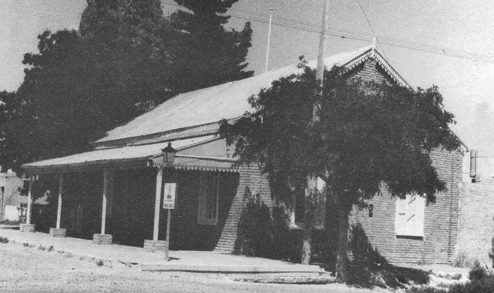 Estación Gaiman en la década de 1960.